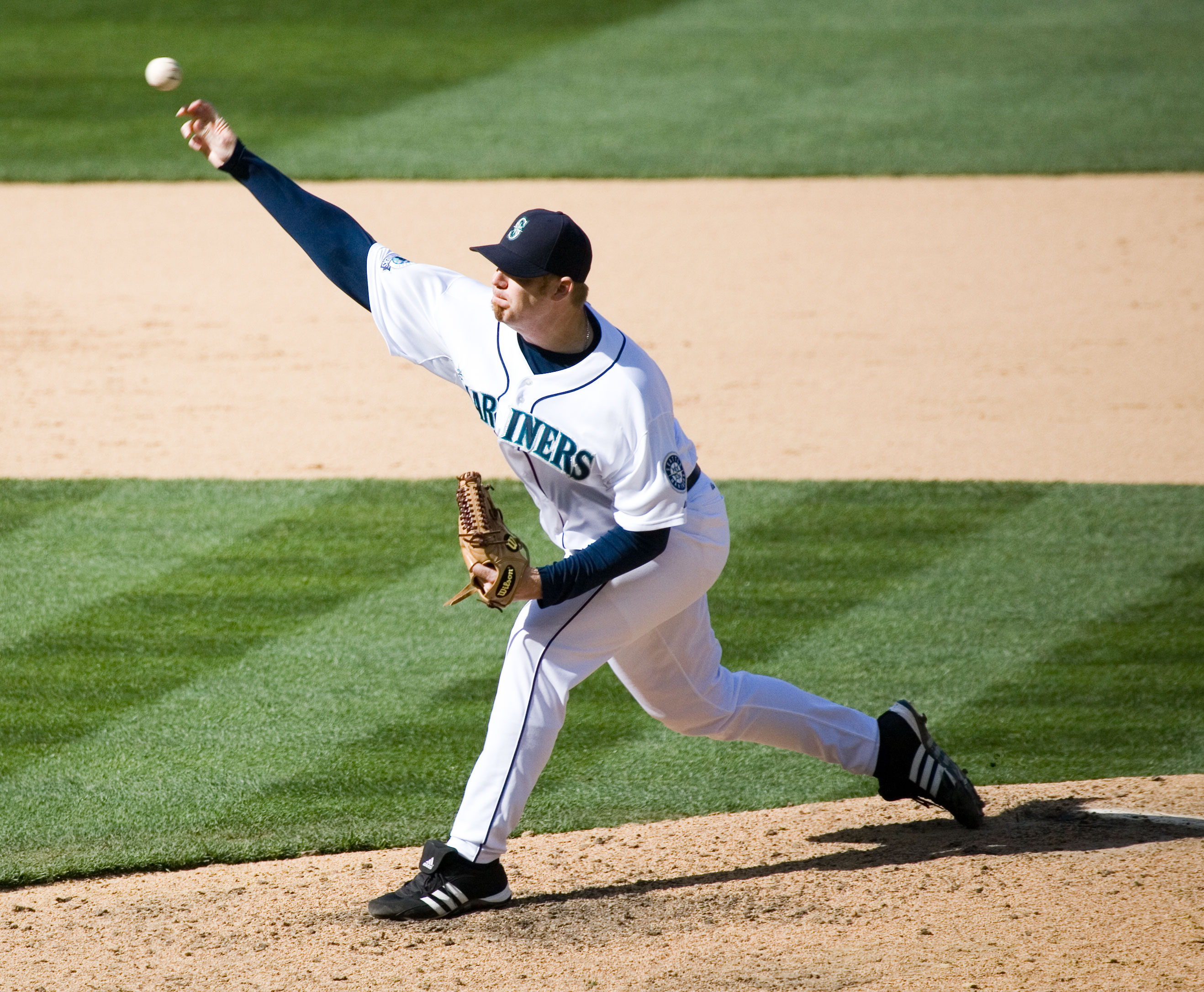 J.J. Putz pitching